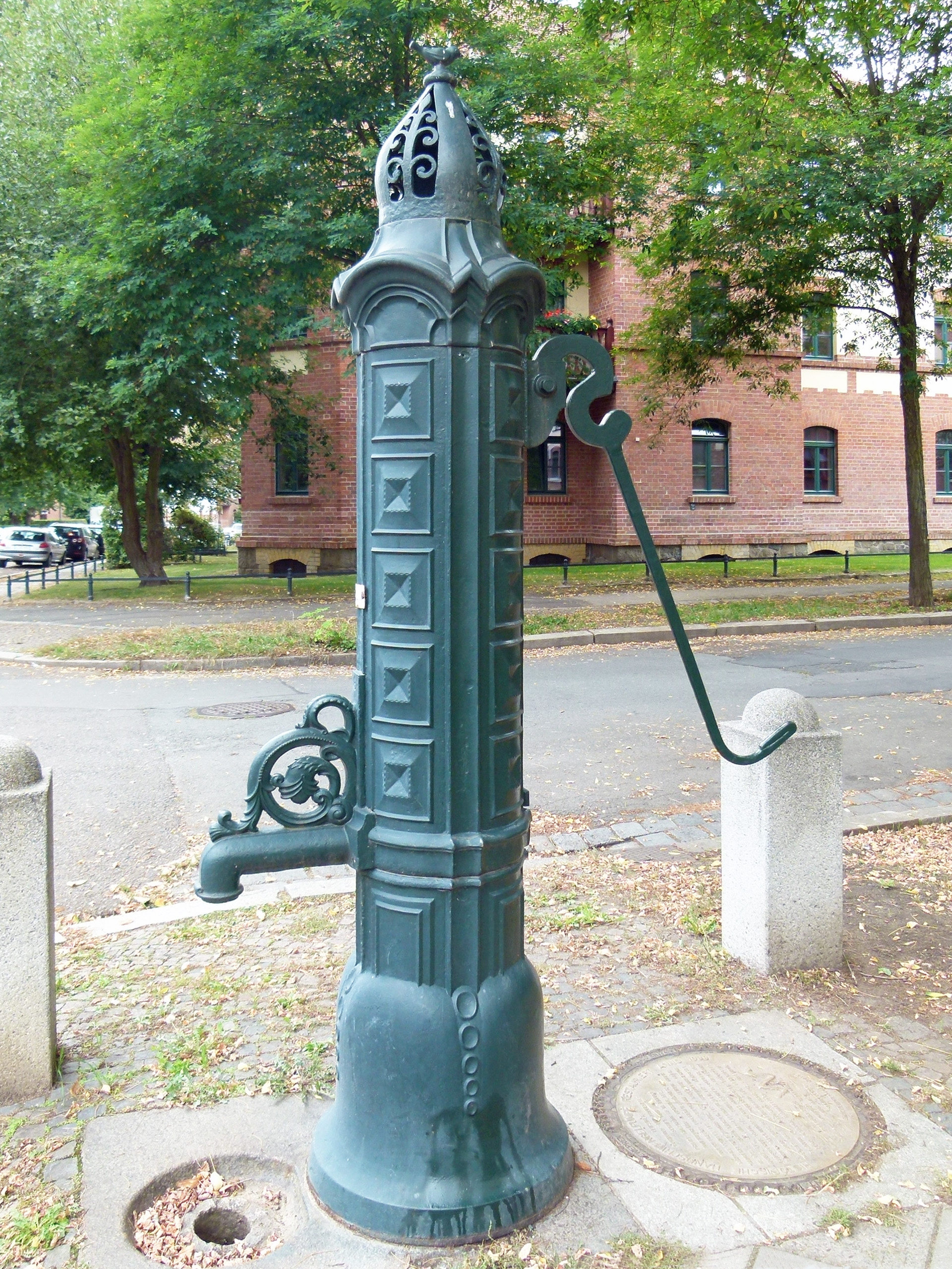 Handschwengelpumpe, Lobstädter Straße, bei Nr. 12, Ecke Ernst-Toller-Straße, Leipzig